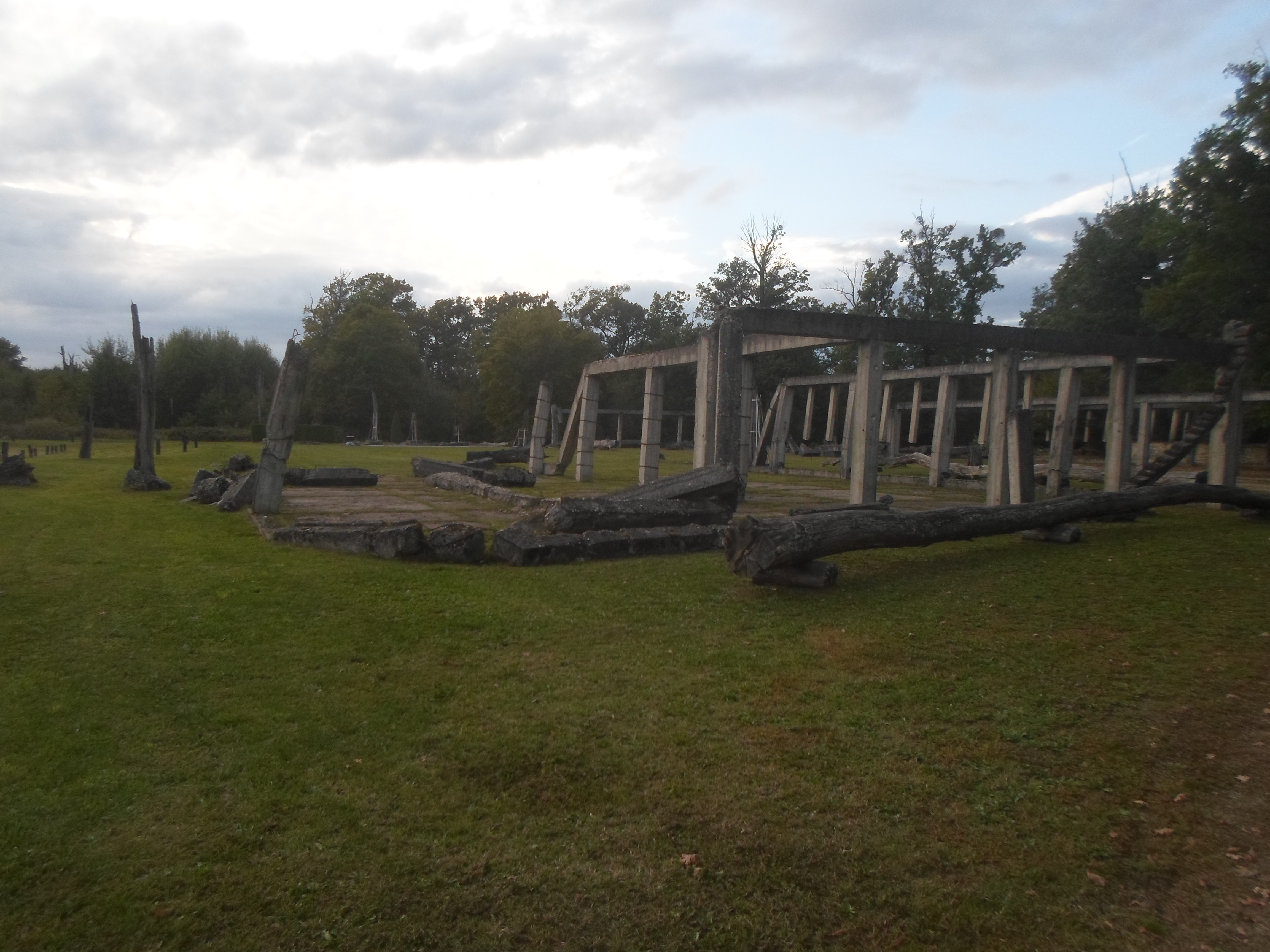 Barutana Bjelovar